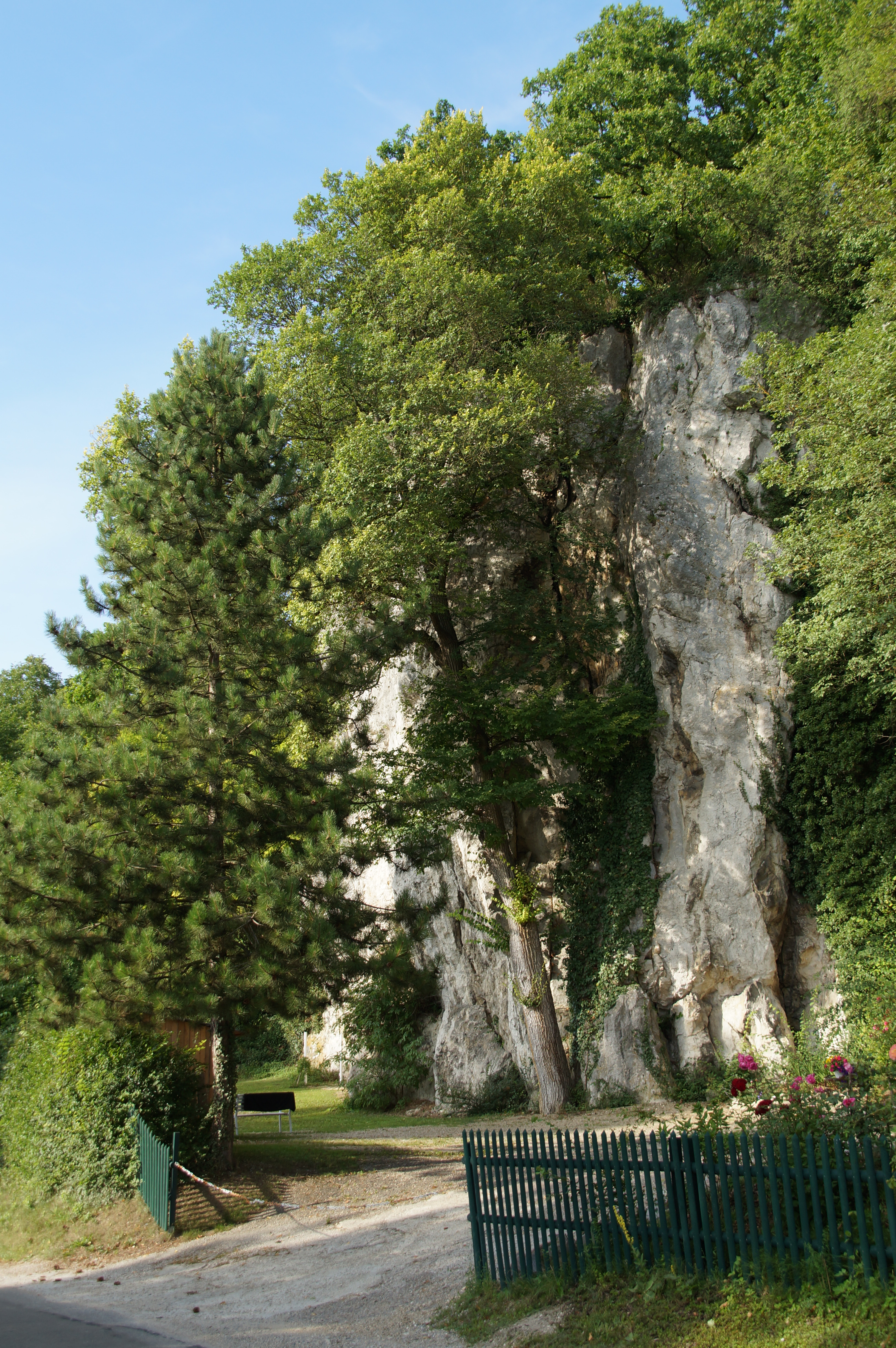 Felsformation im NSG Max-Schultze-Steig bei Regensburg in der Nähe des Schwalbennests